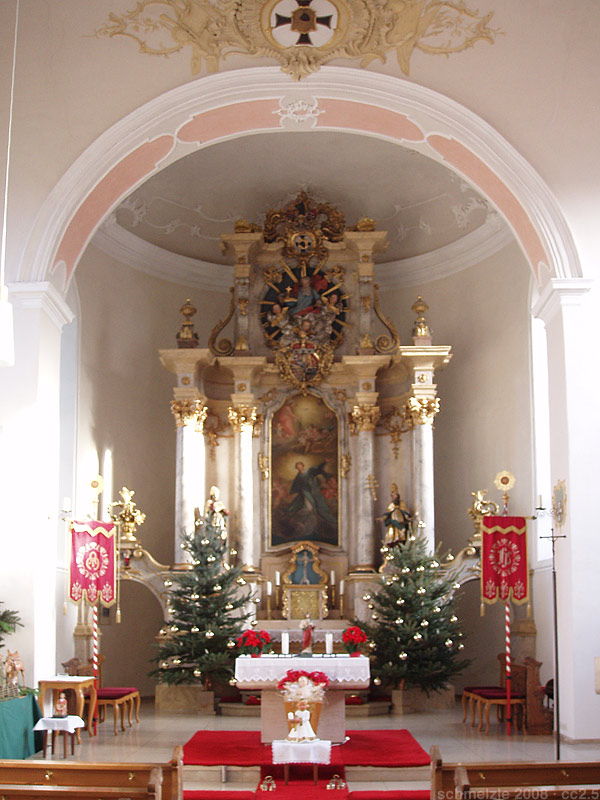 Barocker Hochaltar in der St.-Alban-Kirche in Offenau